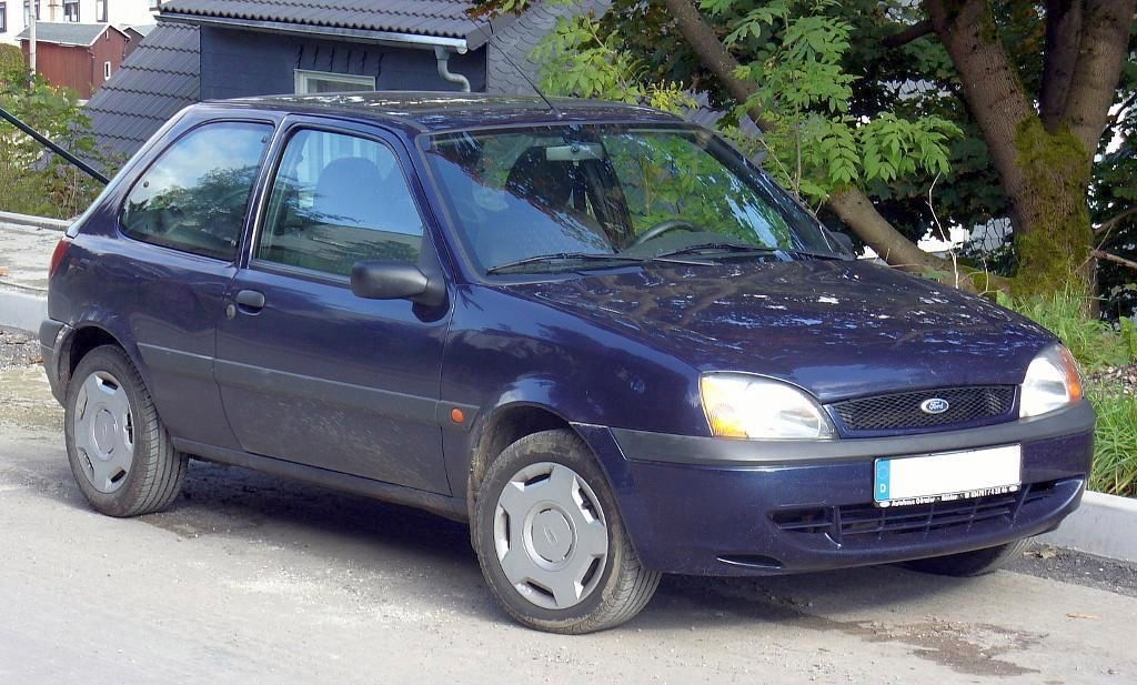 Ford Fiesta